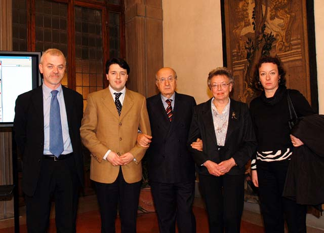 LA SALA DELLA GIUNTA DELLA PROVINCIA DI FIRENZE ORA PORTA IL NOME DI NICOLA PISTELLI L’onorevole Ciriaco De Mita ha ricordato la figura delll’uomo politico fiorentino Commosso intervento del figlio Lapo. Matulli: “Fu la stagione della speranza” Con una cerimonia, a tratti commovente, nel pomeriggio è stata intitolata a Nicola Pistelli la Sala Rossa della Provincia, in Palazzo Medici Riccardi. E’ stato proprio il Presidente della Provincia, Matteo Renzi, a ricordare in apertura della cerimonia “La testimonianza indelebile lasciata da Nicola Pistelli nella sua breve vita”. L’uomo politico fiorentino, che perse la vita nel 1964 per un incidente stradale, è stato definito da Ciriaco De Mita, come “Uomo di parte con l’impegno di governare il tutto”. L’ex segretario della Democrazia Cristiana, che condivise con Pistelli gli anni giovanili dell’impegno politico nella sinistra Dc, ha riconosciuto nel lavoro giornalistico e politico di Nicola Pistelli, la “Capacità di anticipare quello che è poi avvenuto nei decenni successivi, sia nella politica interna che in quella internazionale”. Commosso il breve intervento di Lapo Pistelli, che al momento della scomparsa del padre aveva solo tre mesi. Dopo una breve riflessione sul terribile e intenso significato che assume ogni morte precoce, Lapo Pistelli ha sottolineato “L’esempio attualissimo della serietà della politica” che deriva ancora oggi da quella stagione politica fiorentina degli anni Cinquanta e Sessanta che suo padre visse insieme a personaggi del calibro di La Pira, Meucci, Gozzini, padre Turoldo, e don Milani. “La stagione della speranza” come l’ha definita Matulli. (Da sinistra Lapo Pistelli, Matteo Renzi, Ciriaco de Mita, Alessandra e Tiziana Pistelli)